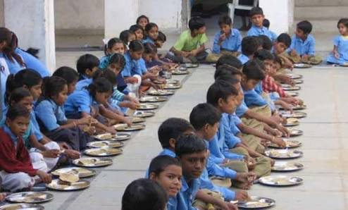 মিড-ডে-মিল